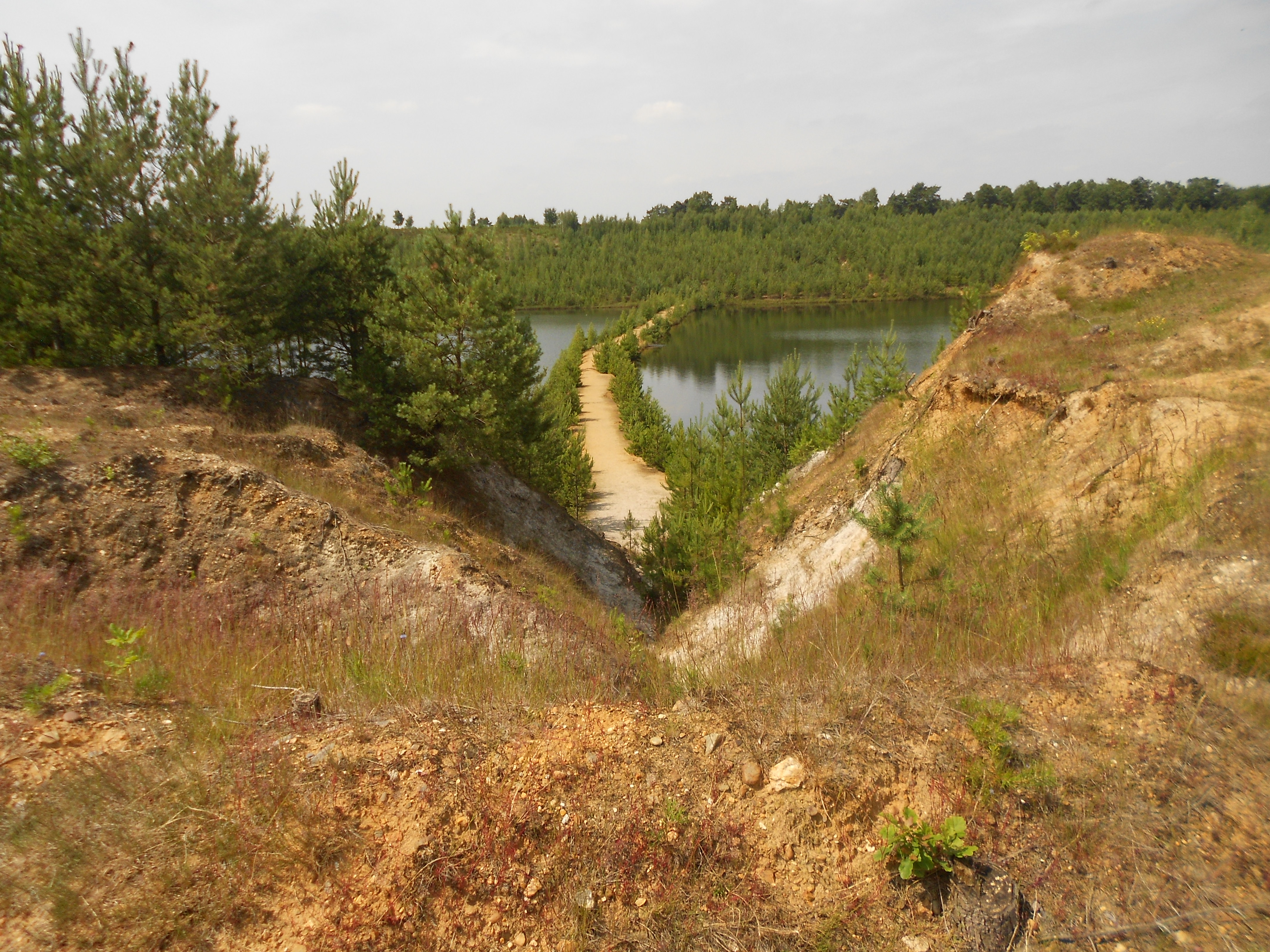 Vallei van de Kikbeekbron (Nationaal Park Hoge Kempen, Limburg).